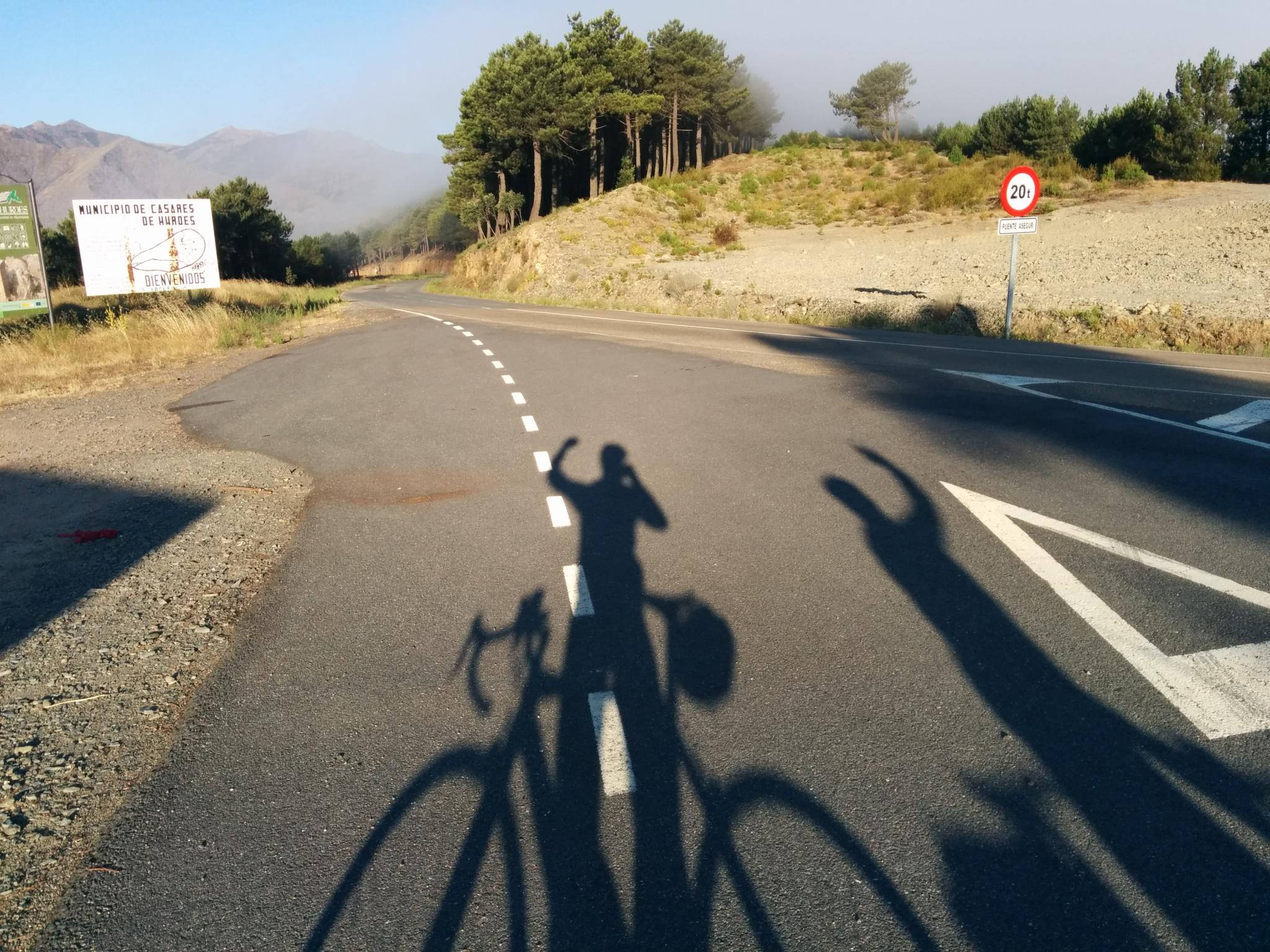 Madrugón en la última etapa porque teníamos que llegar a Salamanca no muy tarde. No sin antes subir las Batuecas, y un par de puertos previos cortitos. Alucinante paisaje, y emocionante subida.